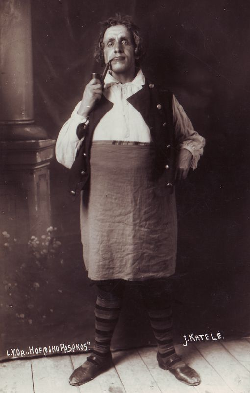 Juozas Katelė (1884 m. liepos 10 d. Suvainiuose, Kupiškio valsčius, Panevėžio apskr. – 1981 m. liepos 25 d. Kaune) – vargonininkas, chorvedys, dainininkas (bosas), pedagogas. Fotografijoje - Žako Ofenbacho operoje "Hofmano pasakos".